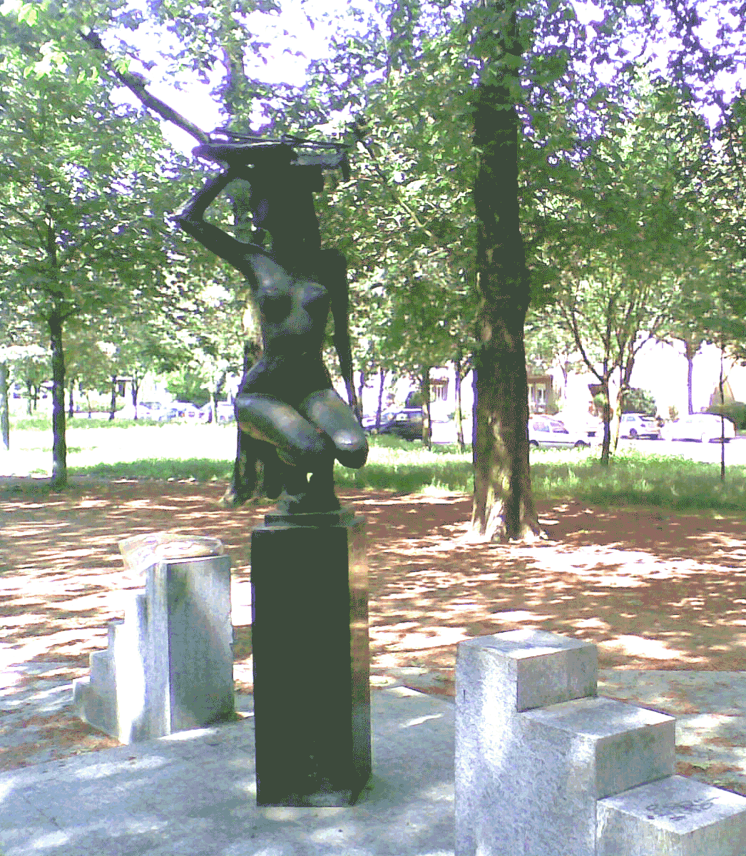 Die Plastik „Nackte am Ostseeplatz“ stellt die Verbindung zum Beginn der Straßen 1913 her.